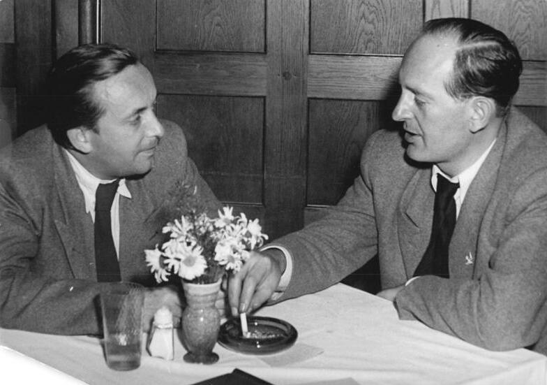 Protestkundgebung für André Stil. Am Donnerstag, dem 19. Juni 1952, um 19 Uhr veranstaltet der Deutsche Schriftstellerverband im Klubhaus der Kulturschaffenden, Berlin W8, Jägerstrasse 2, eine Kundgebung für den eingekerkerten französischen Schriftsteller, Friedenspreisträger André Stil. UBz: Vor Beginn der Kundgebung, Prof. Havemann (rechts) im Gespräch mit dem Astrophysiker Otto Singer (links).